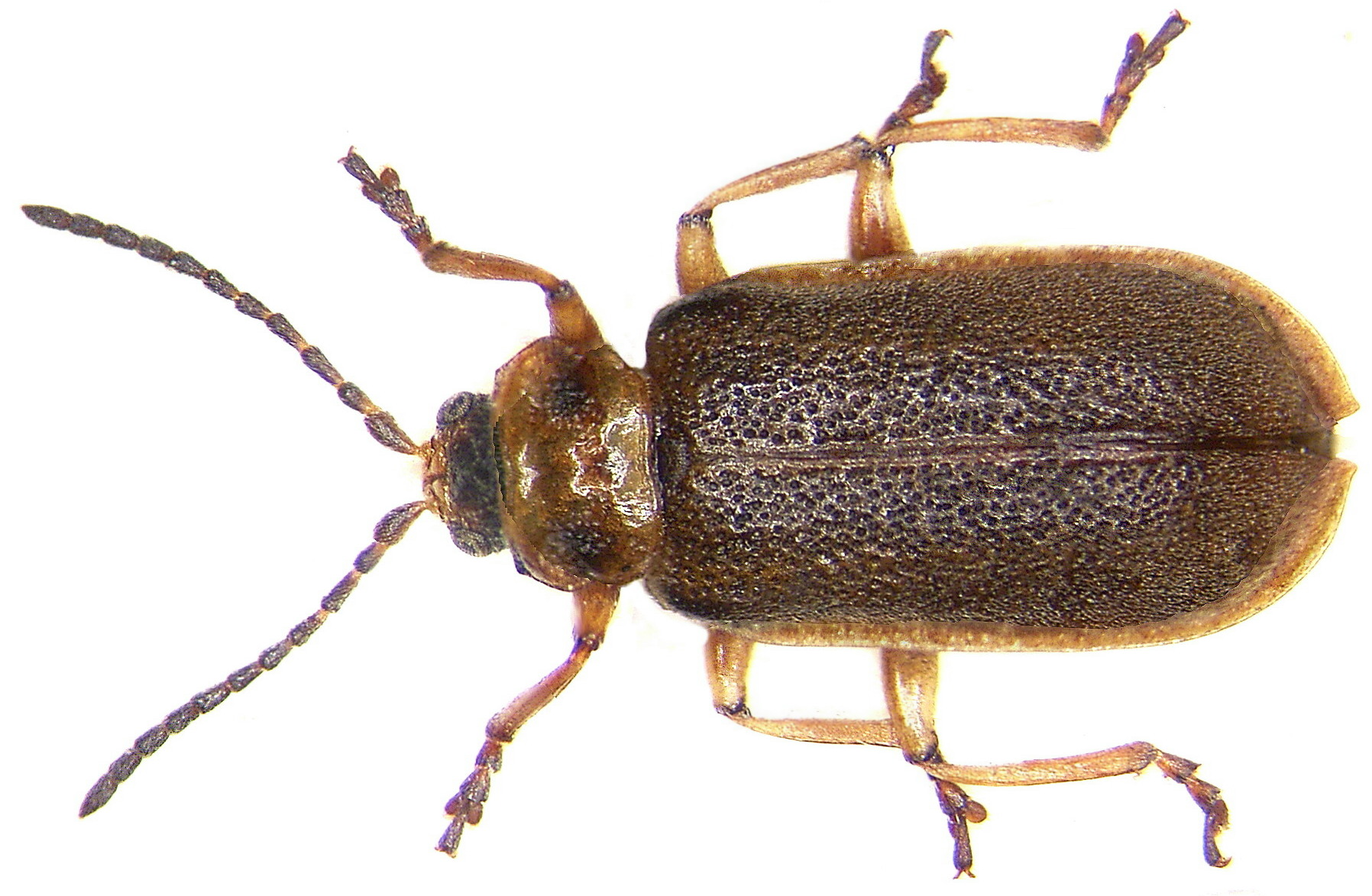 Familie: Chrysomelidae Grösse: 6-8 mm Verbreitung: Europa Ökologie: an Polygonaceen Fundort: Germania, Oberfranken, Weissenstadt leg.det. U.Schmidt, 1974 Foto: U.Schmidt, 2006